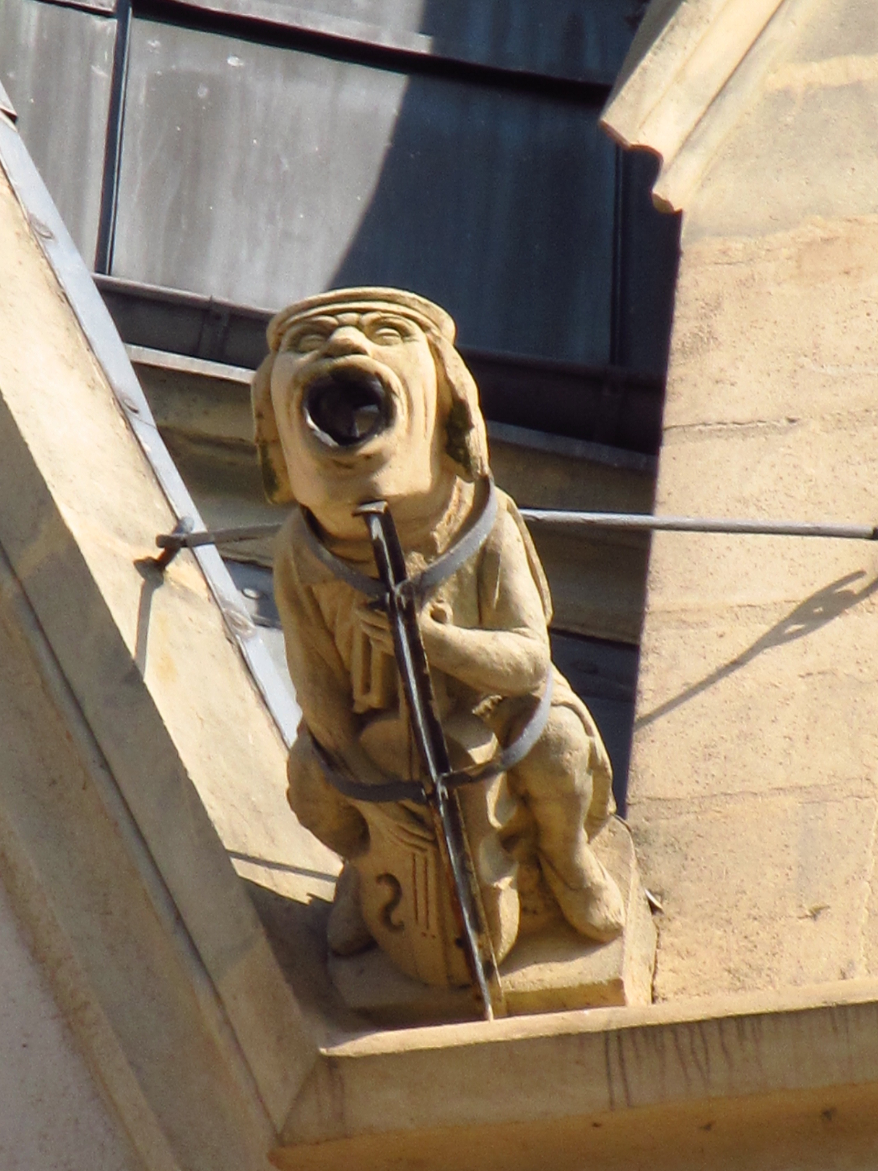 Kostel sv. Antonína Velikého (Liberec), Sokolovské nám., Liberec